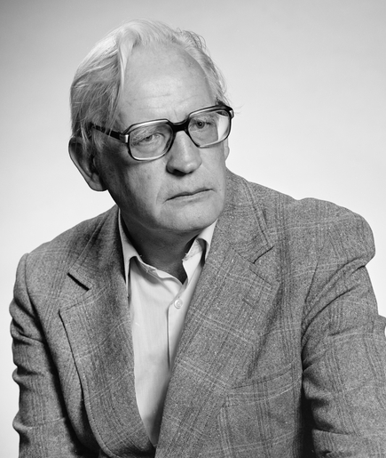 portrett, mann, forfatter, oversetter, journalist, brystbilde.